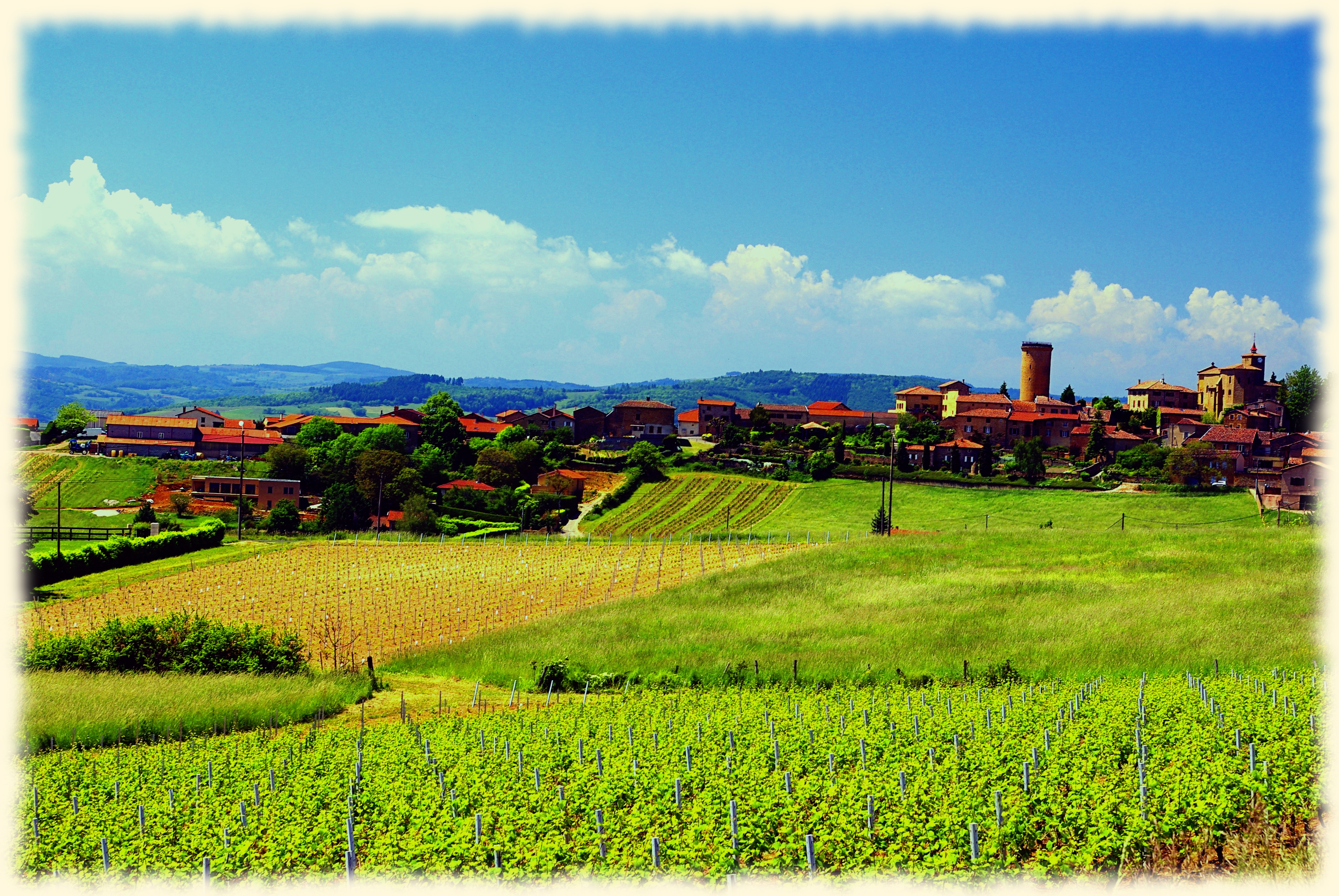 Village médiéval d'Oingt (69620) au pays des Pierres Dorées, dans le Sud Beaujolais, département du Rhône (69), en France.